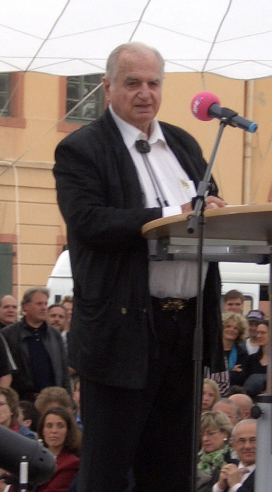 Hans Riegel junior bei der Eröffnung der Haribo-Ausstellung auf der Festung Ehrenbreitstein in Koblenz